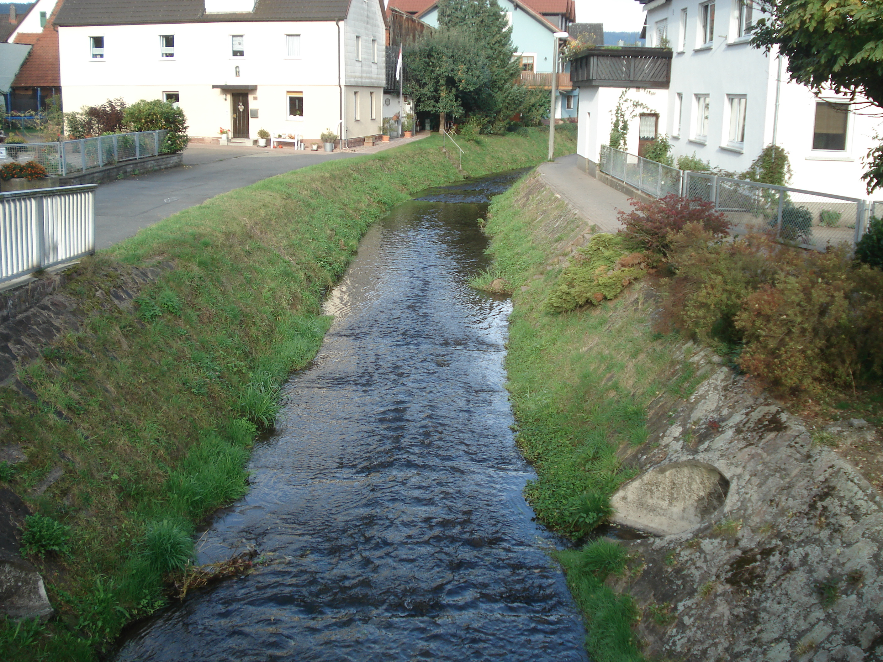 Der Marsbach in Schneeberg